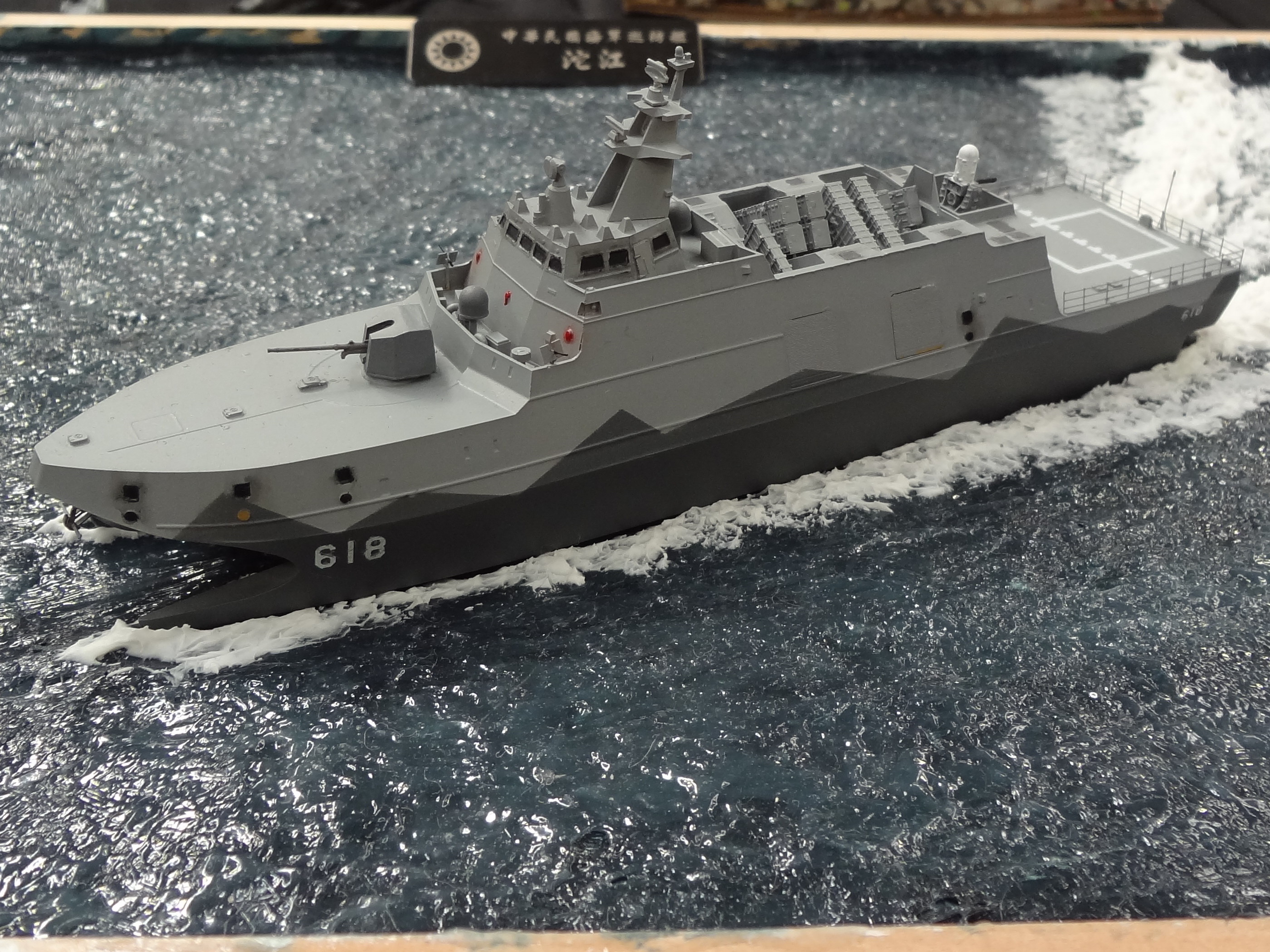 第6屆開拓模型祭，中華民國海軍沱江軍艦（PGG-618）模型。